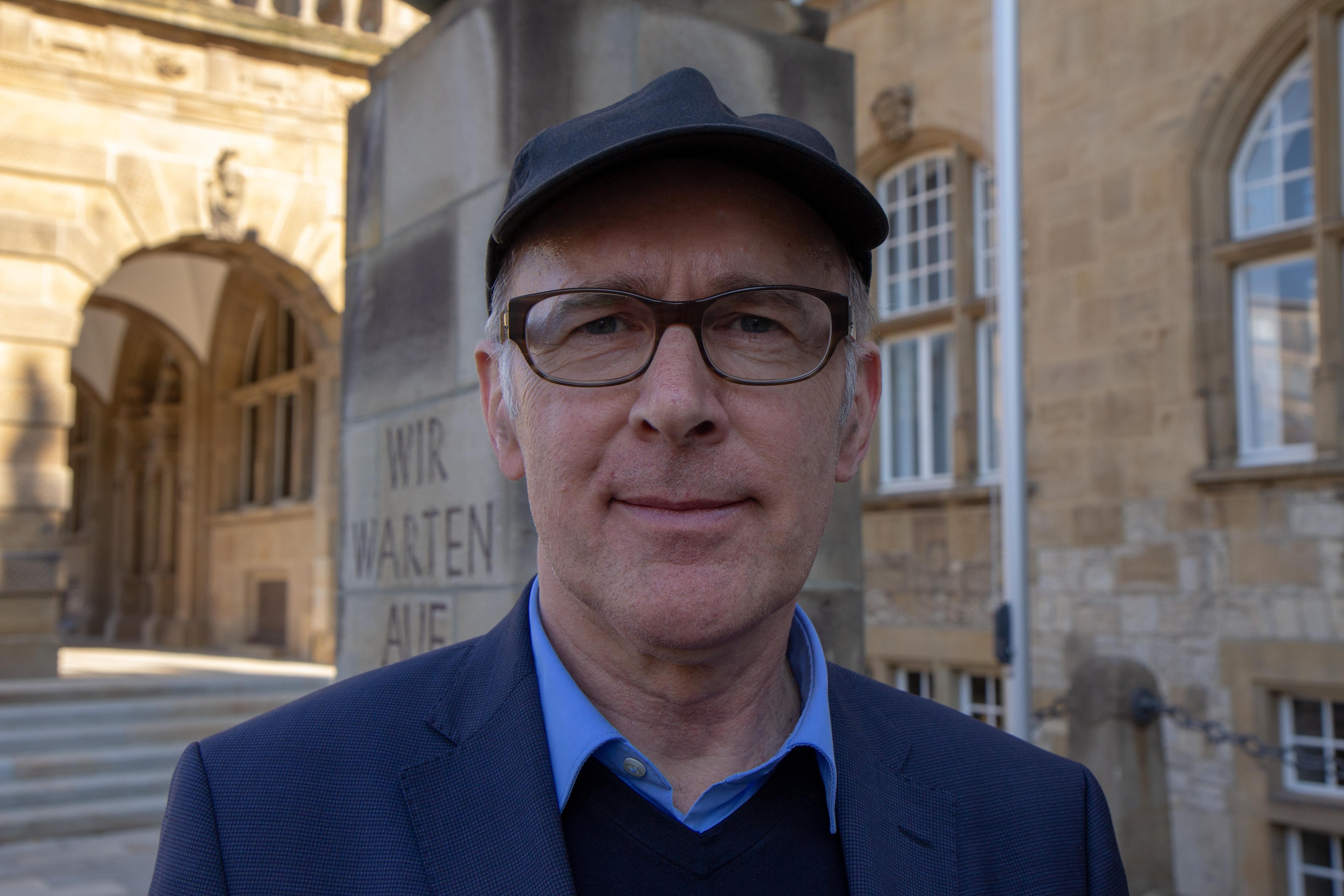 Pressetermin am Set "Wilsberg" am Alten Rathaus in Bielefeld am 15. Oktober 2018.